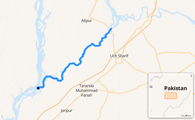 carte réalisée sur umap, [1] This map may be incomplete, and may contain errors. Don't rely solely on it for navigation.